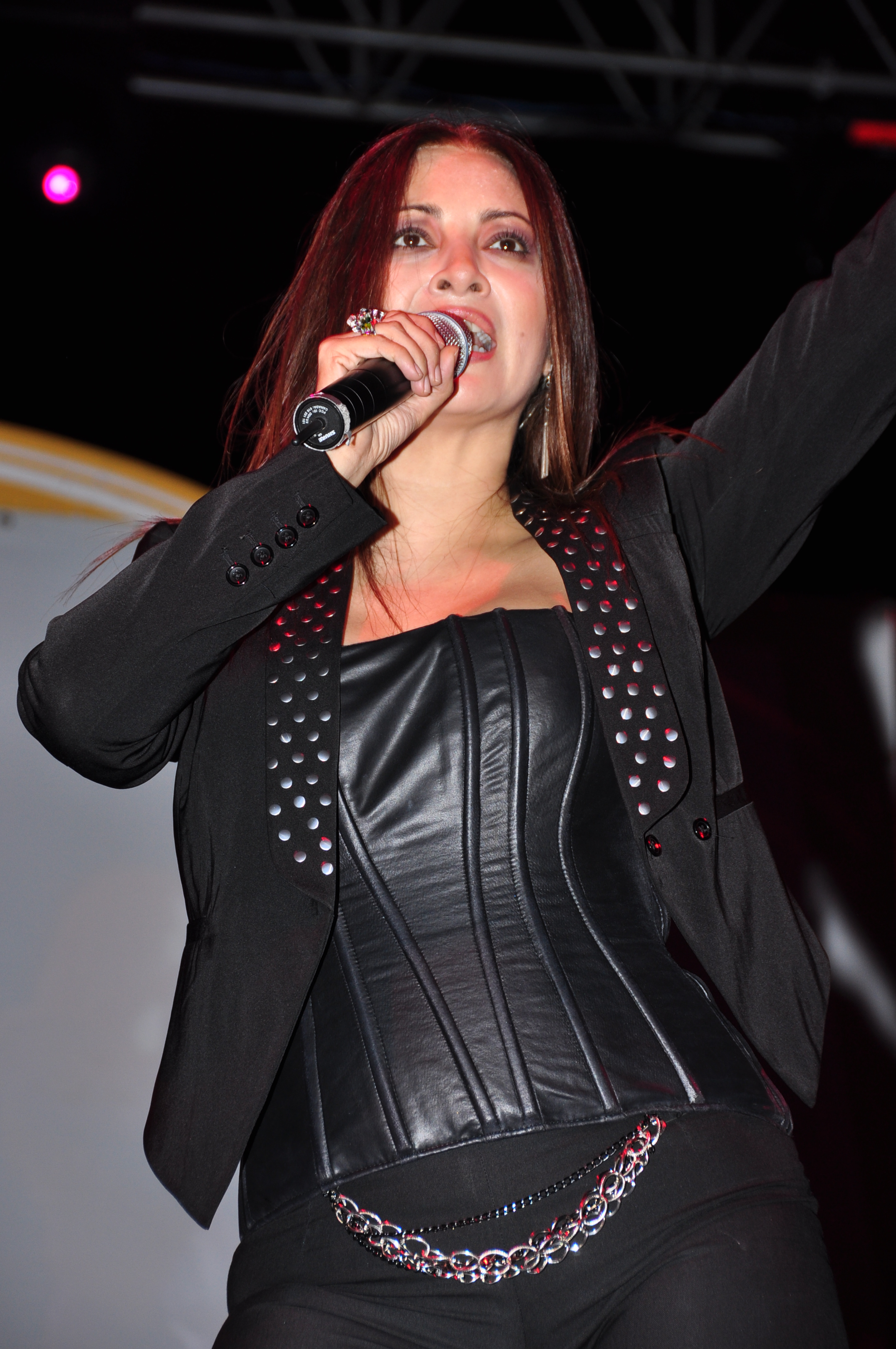 Concierto de Myriam Hernández en Piñas - El Oro - Ecuador, coliseo del ITON